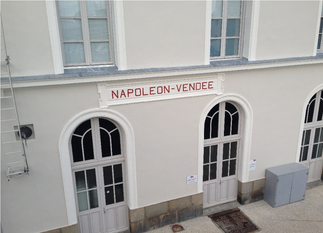 "Napoleon-Vendee"